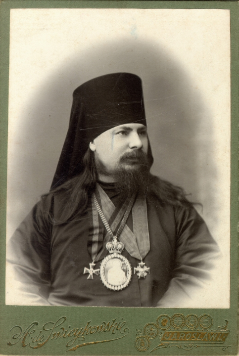 Викарий Ярославской епархии епископ Рыбинский Евсевий (Гроздов), 1909